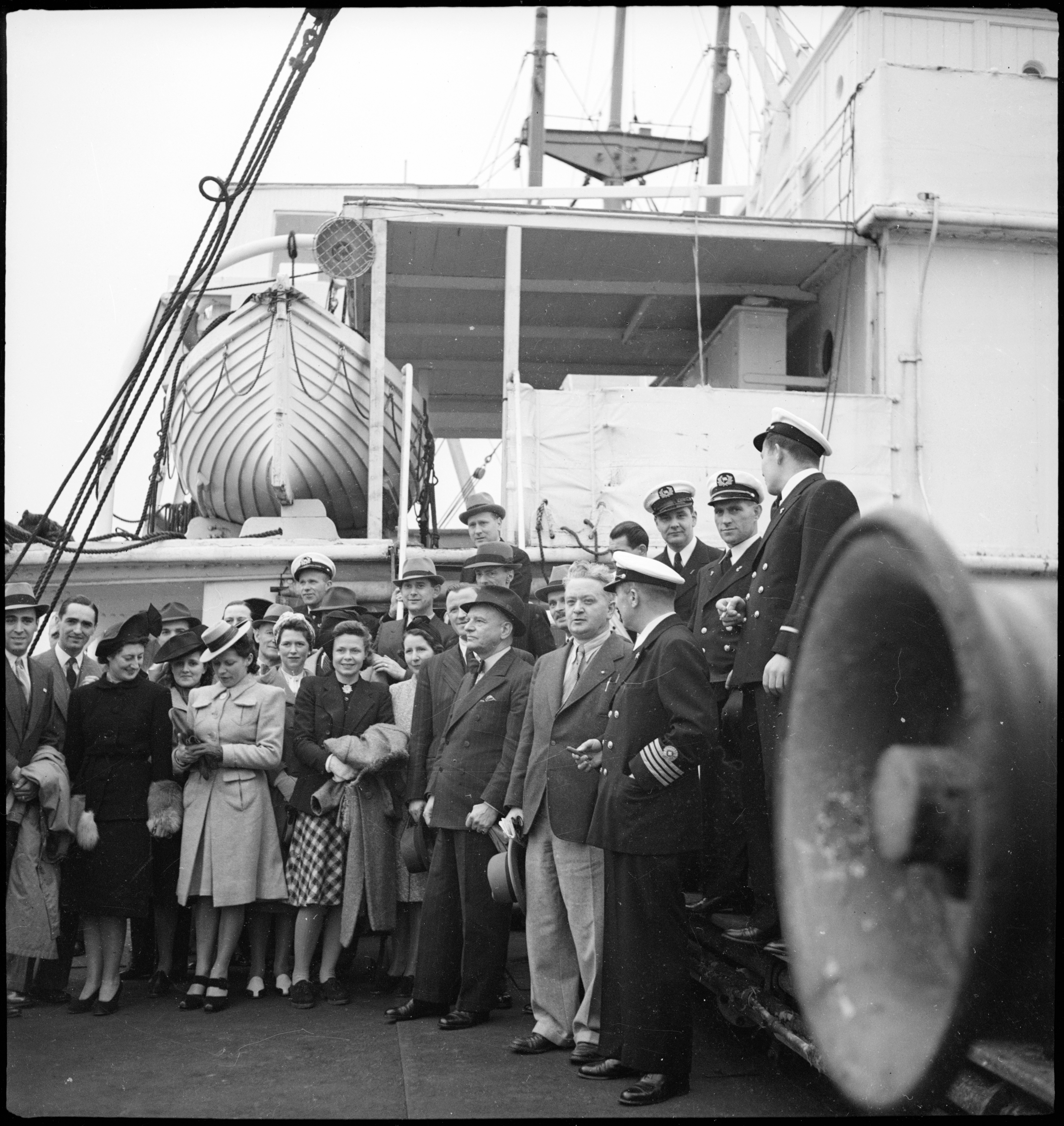 Portugal, Lissabon (Lisboa): Schiff Calanda; Frauen und Männer zusammen mit den Schiffsoffizieren an Deck